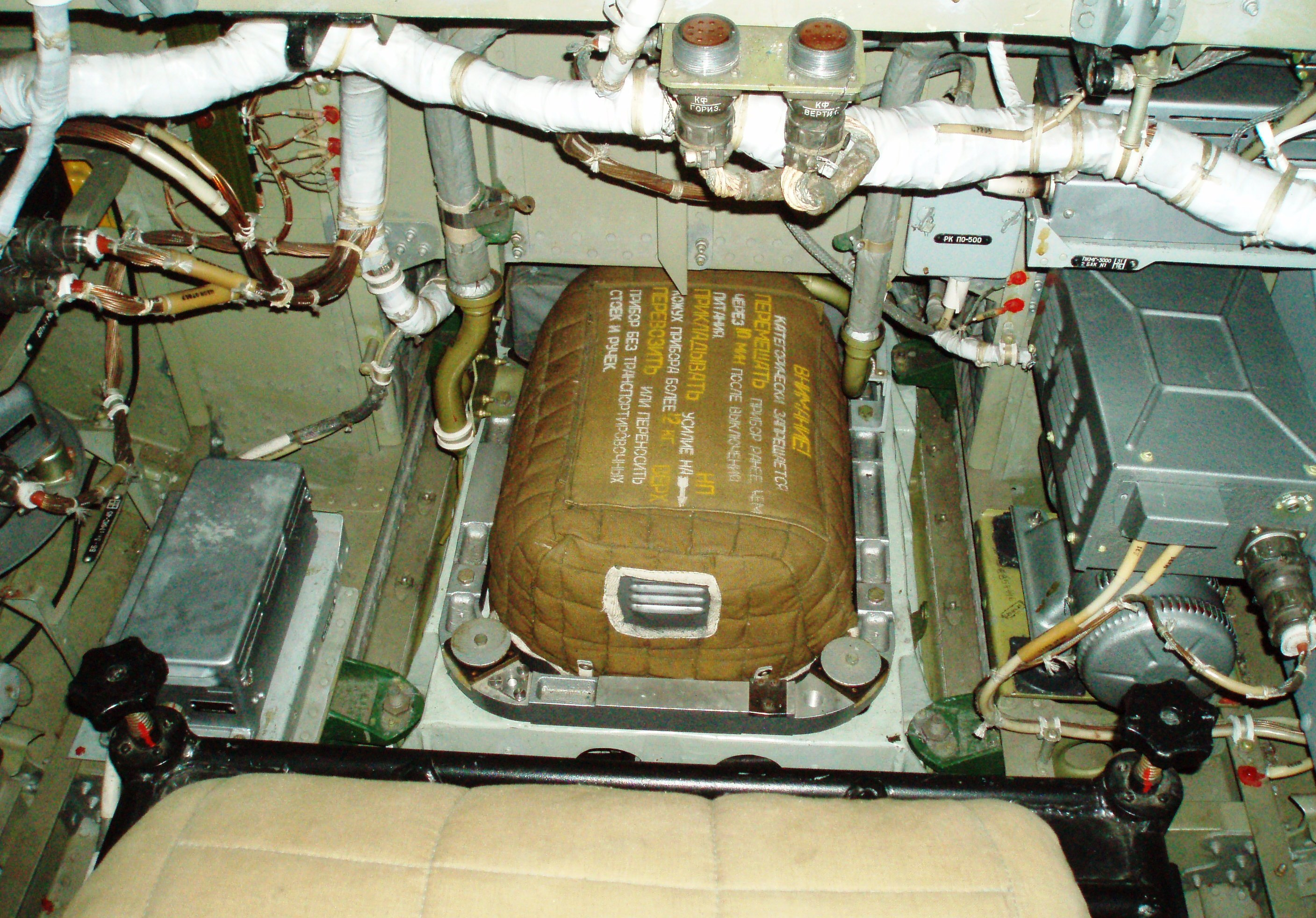 МИС-45